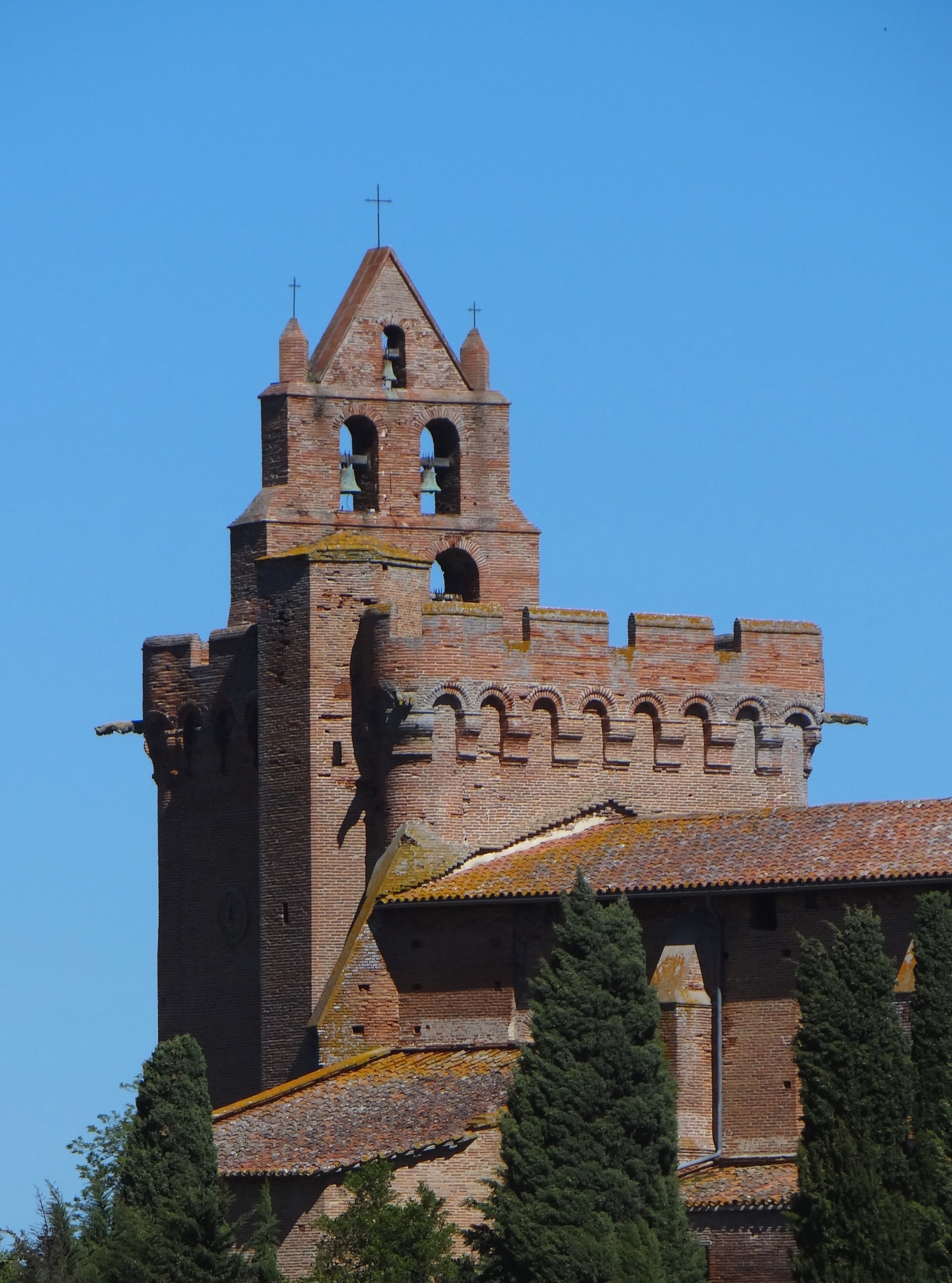 Terrasse de la tour du clocher, avec clocher-mur caractéristique